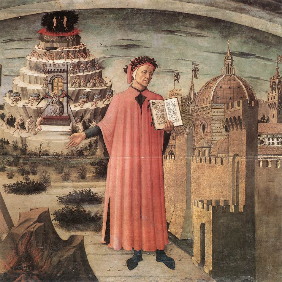 detail